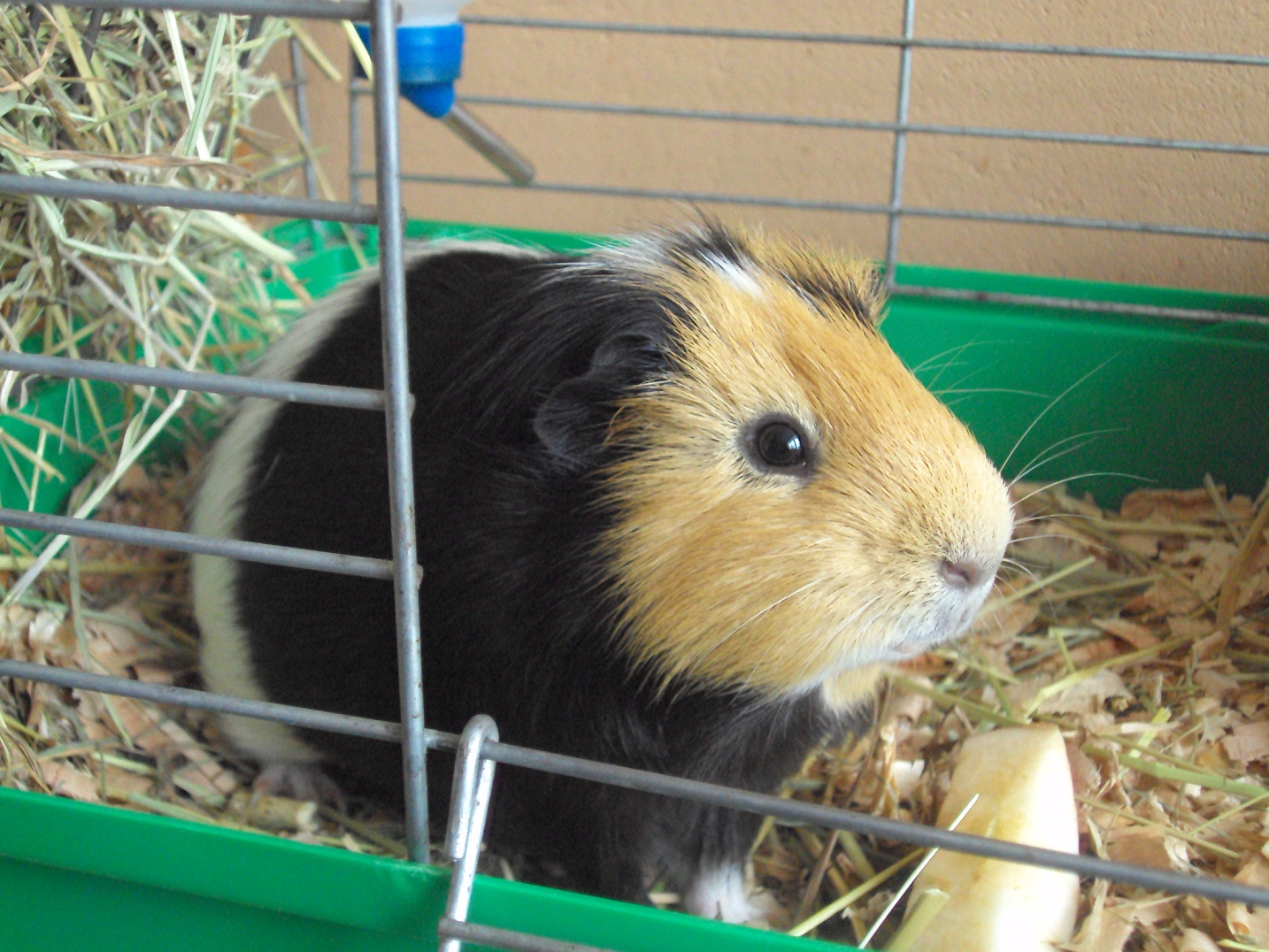 swinka morska w klatce